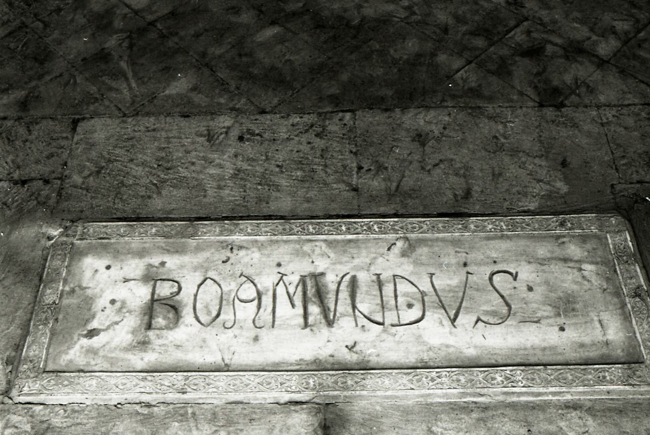 Servizio fotografico : Canosa di Puglia, 1970 / Paolo Monti. - Strisce: 7, Fotogrammi complessivi: 36 : Negativo b/n, gelatina bromuro d'argento/ pellicola ; 35 mm. - ((I fotogrammi hanno una doppia numerazione. . - Sul portanegativi: Nikon FP4. - Sul dorso del portanegativi Monti specifica: "Tomba di Boemondo". - Occasione: Documentazione Puglia: scultura e castelli. - Fonte: Agenda di Paolo Monti: Monti - Agenda 1970 (1970), presso Archivio Paolo Monti